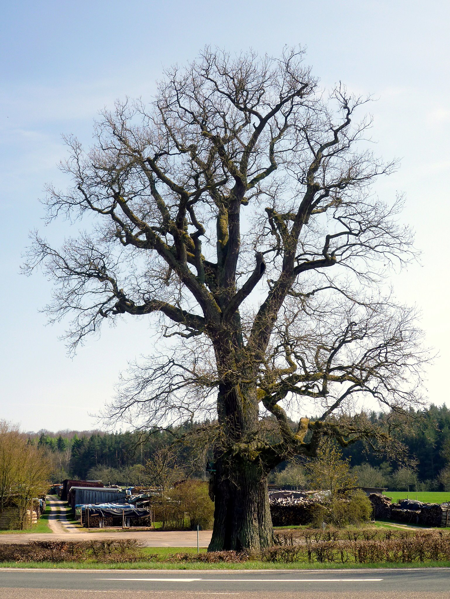 Bildeiche Albertshausen